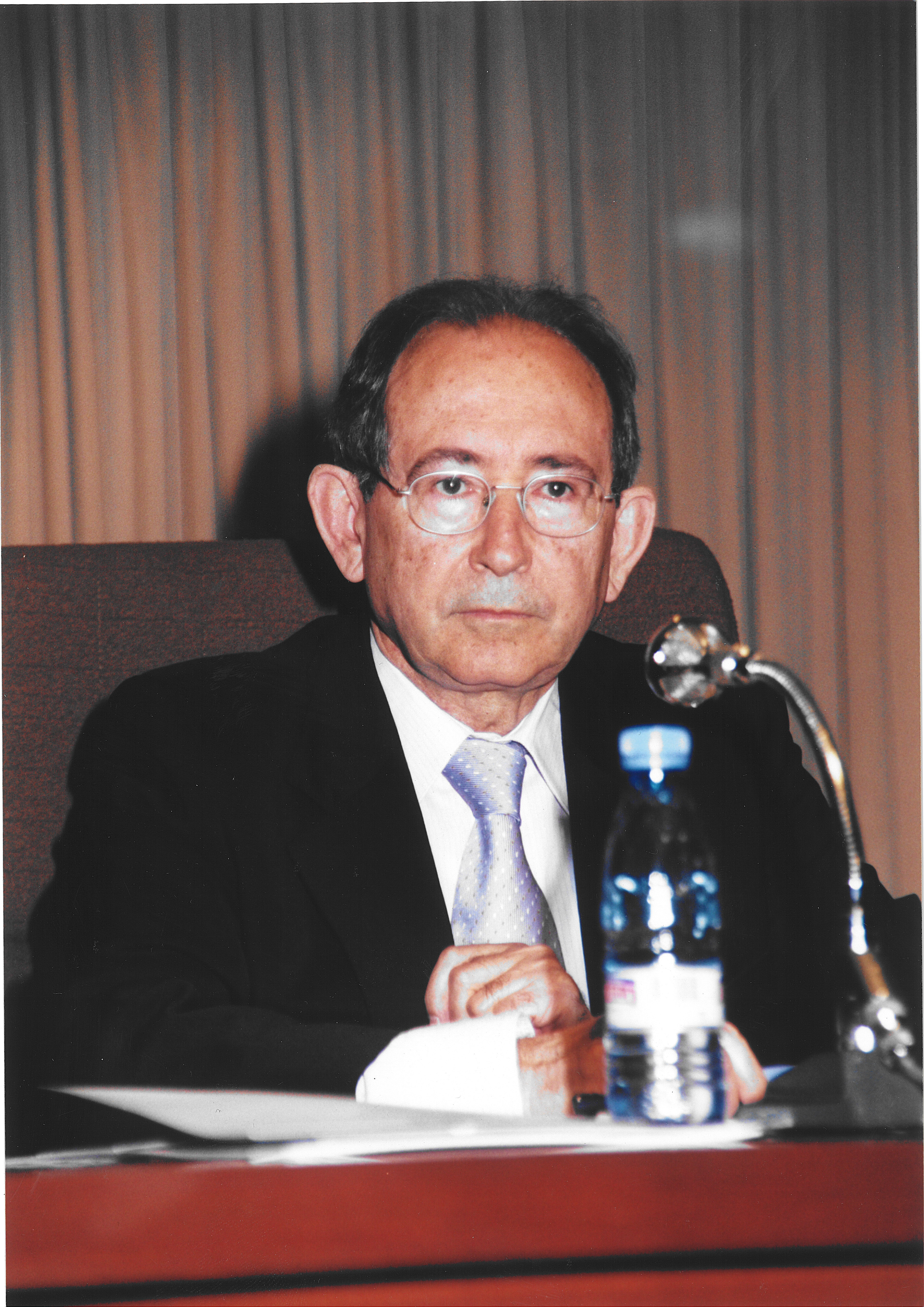 Manolo Fraijó durante una conferencia